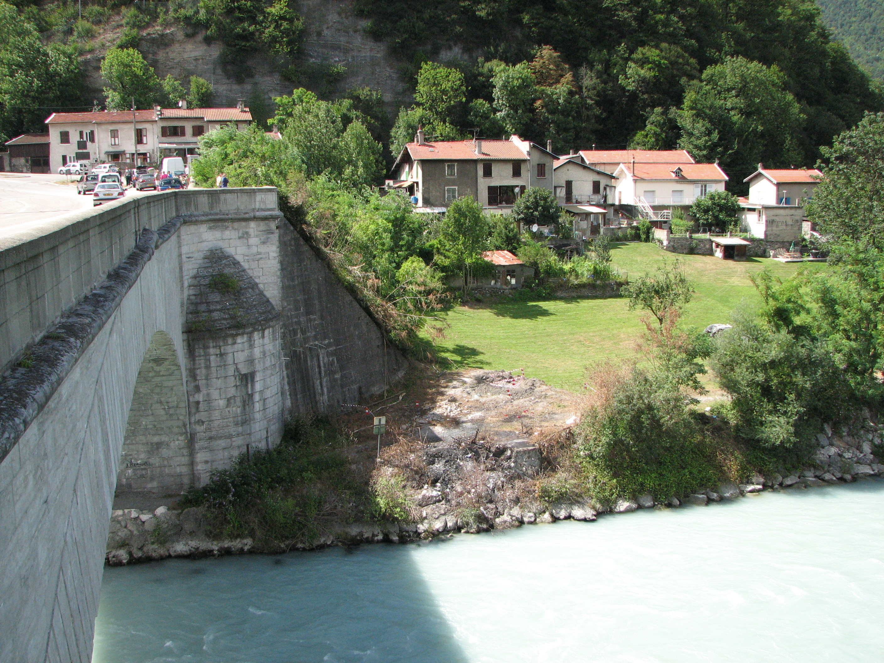 Lieu de l'accident du car polonais en bas de la descente de Laffrey, photo prise sur le pont franchissant la Romanche, coté Vizille (Isère)